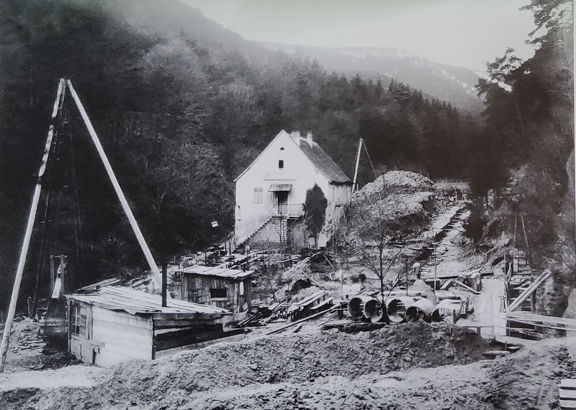 Bau der Stichaner-Jordanschen Wasserleitung aus dem Gimmeldinger Tal, Pfälzerwald, nach Deidesheim im Jahr 1907. Im Hintergrund ist die 1958 abgerissene Obere Mühle.